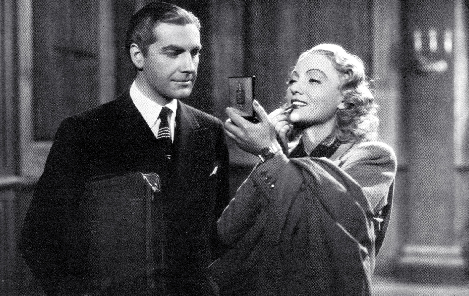 Una scena di Documento Z 3 con Claudio Gora ed Isa Miranda (Guarini, 1942)